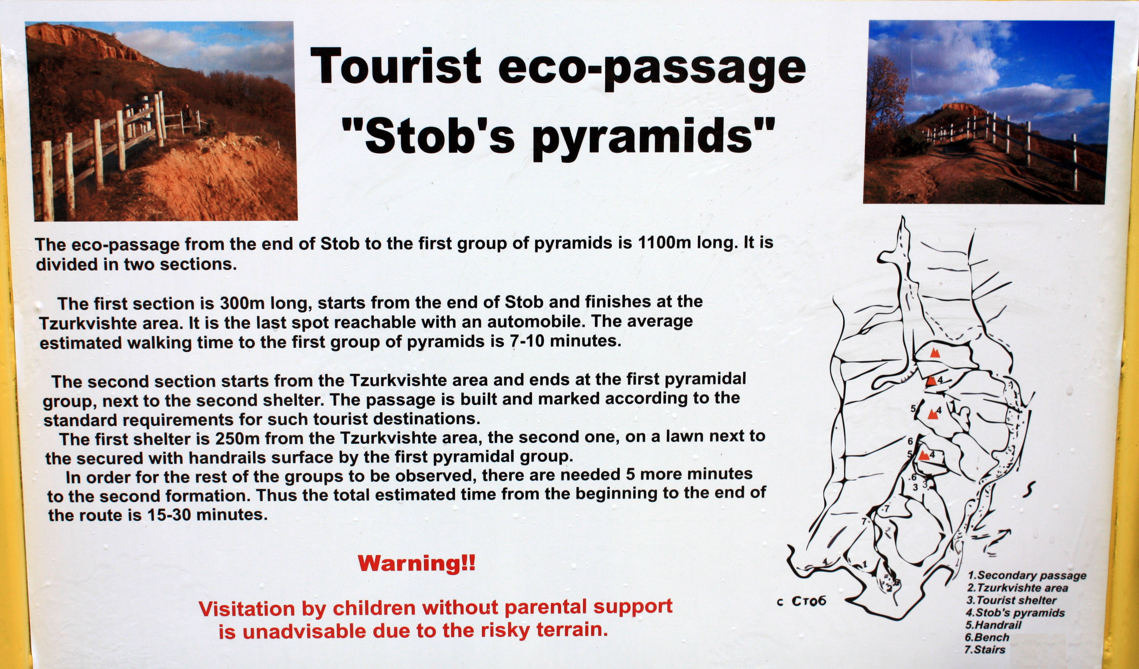 Touristeninformationstafel